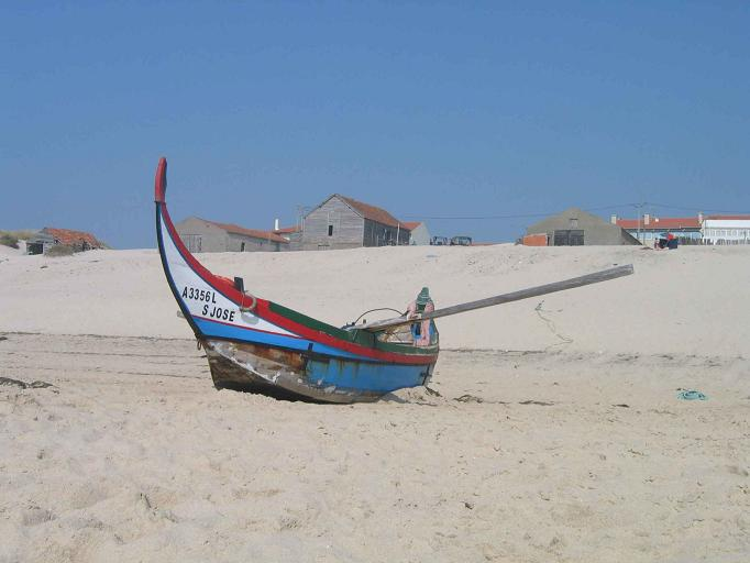 Praia de Mira - Barco